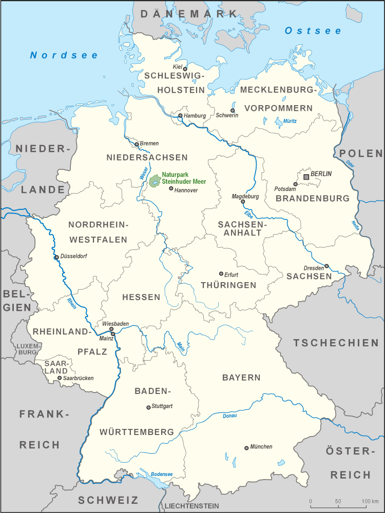 Karte des Naturparks Steinhuder Meer in Deutschland